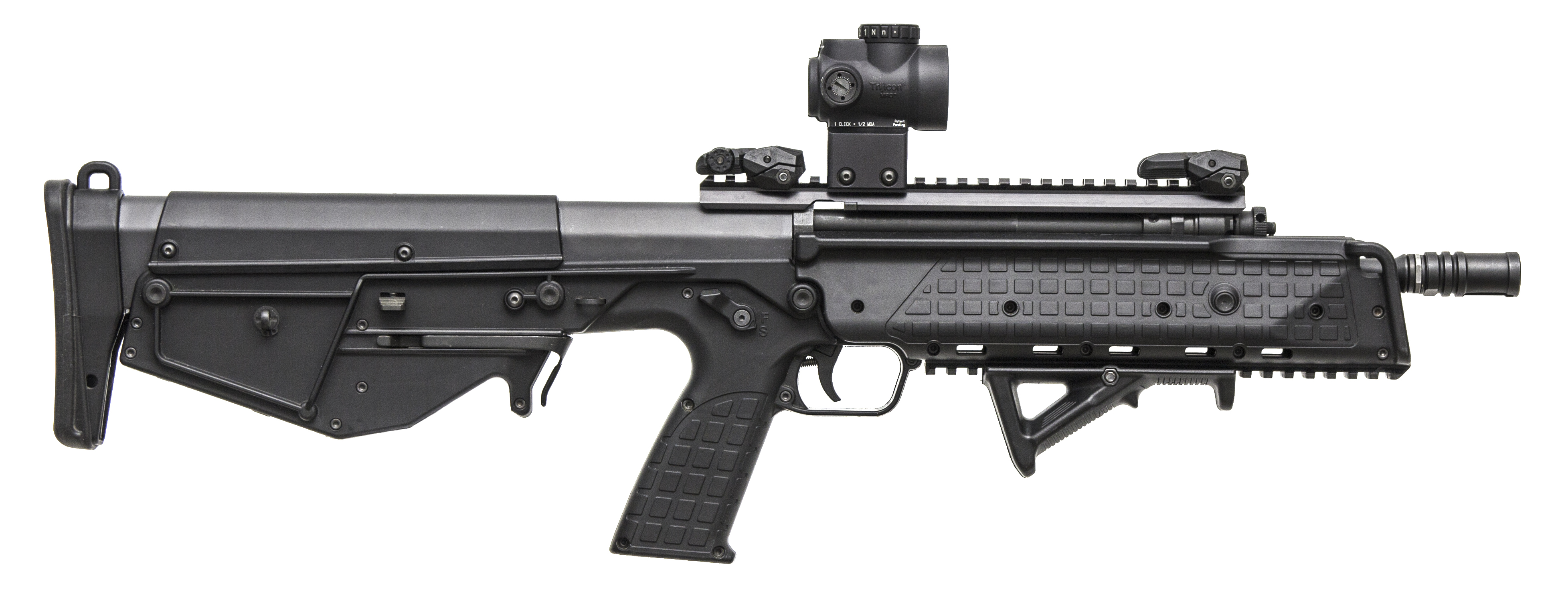 Kel-Tec RDB muni d'un point Rouge MRO Trijicon